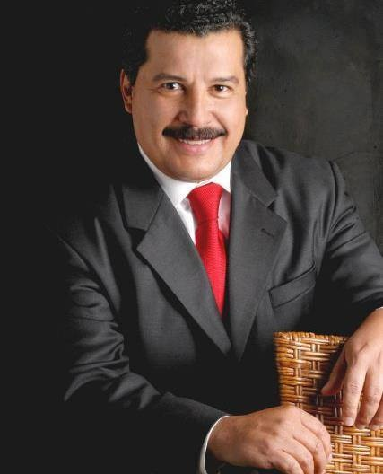 Fotografia Victor Valencia de Los Santos